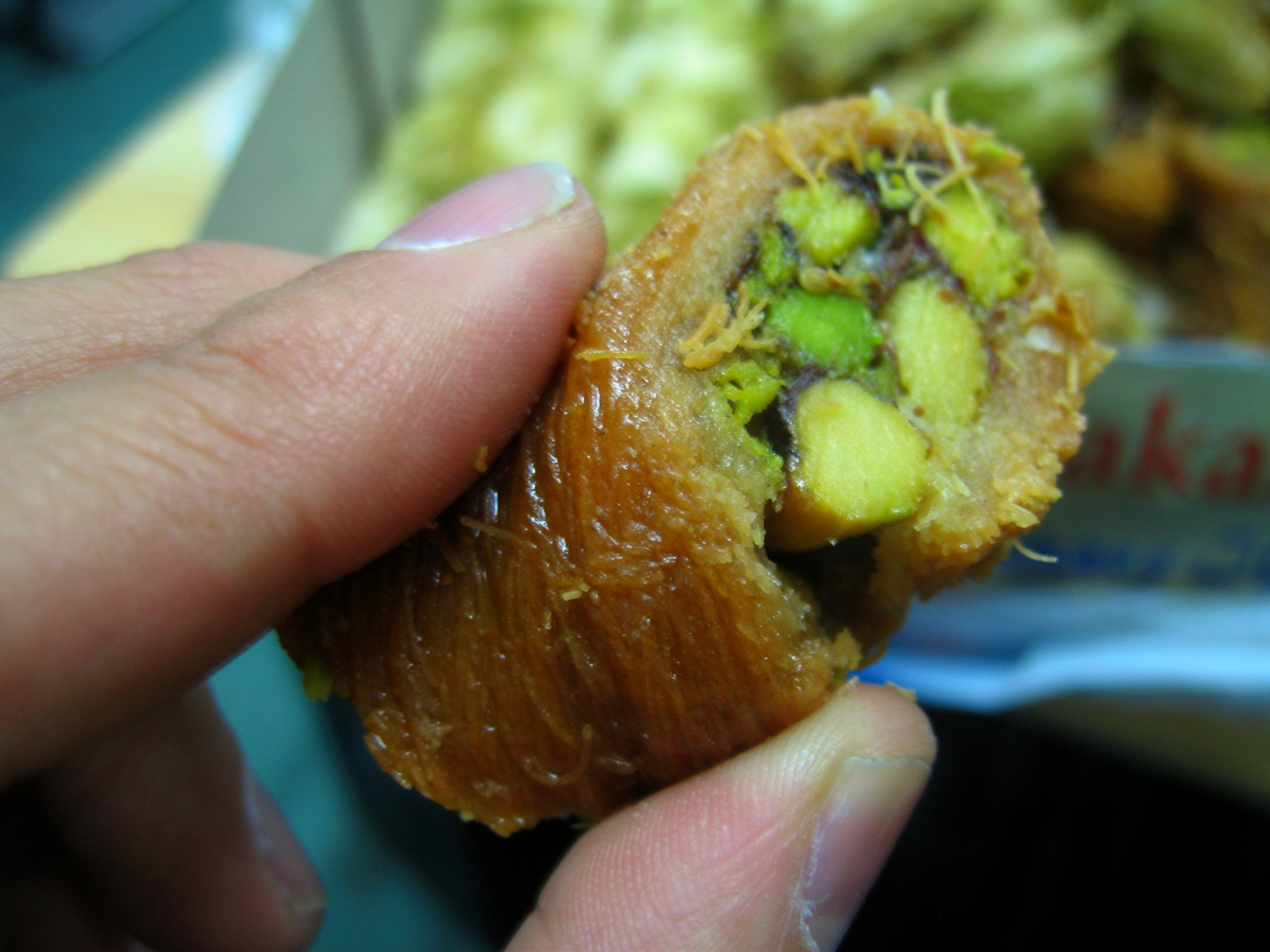 Baklava